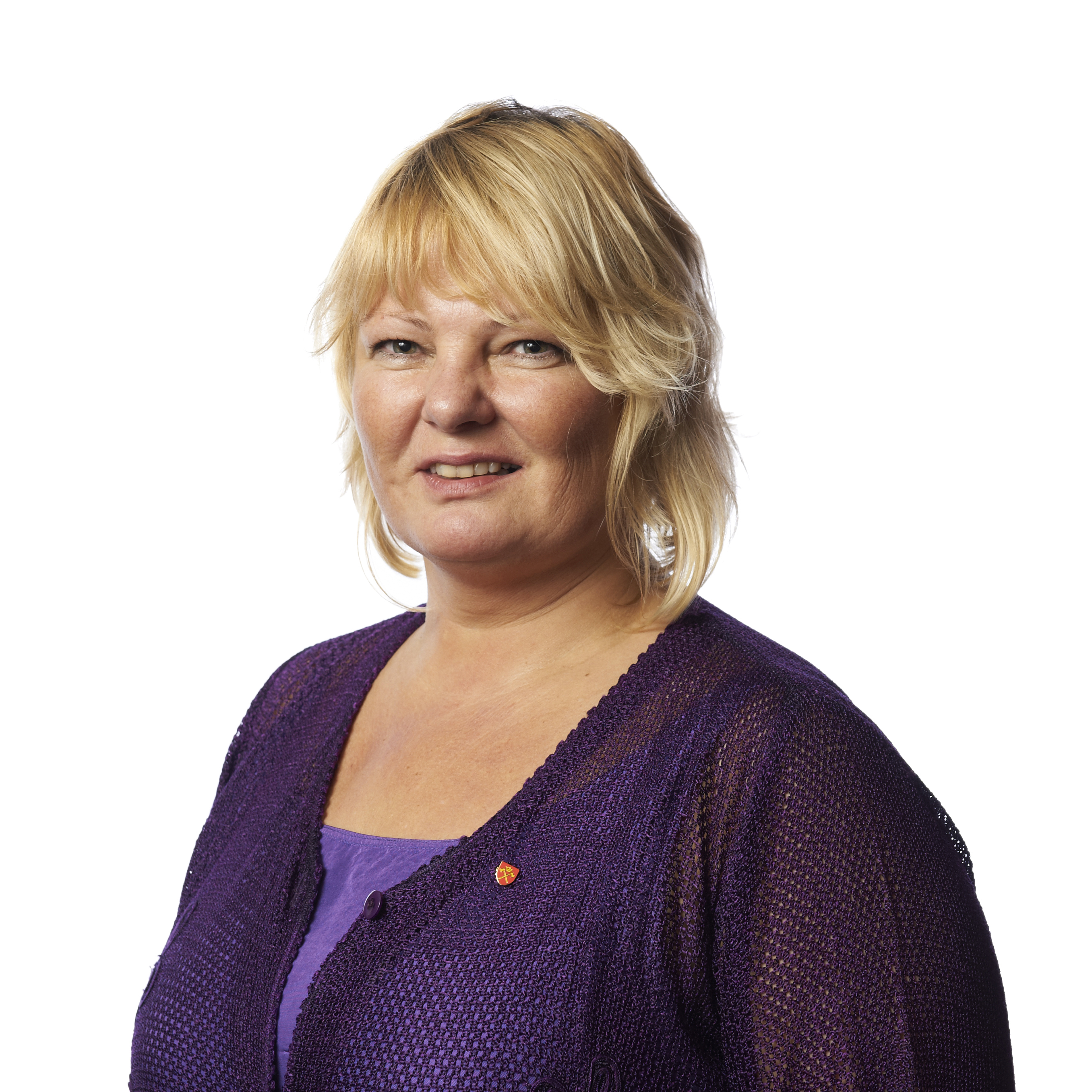 Astrid Farestveit Selsvold, Arbeiderpartiet , fylkesutvalet